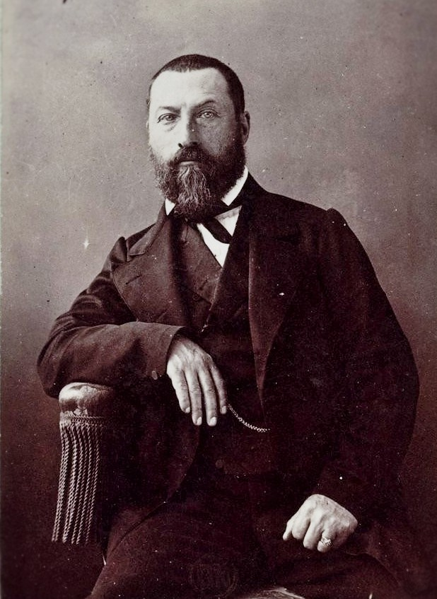 Titre : Jean Macé, littérateur : [photographie, tirage de démonstration] / [Atelier Nadar] Auteur : Atelier Nadar. Photographe Date d'édition : 1900 Sujet : Macé, Jean (1815-1894) -- Portraits Sujet : Portraits -- 19e siècle Type : image fixe,photographie Langue : Français français Format : 1 photogr. pos. sur papier albuminé : d'après négatif sur verre ; 8,5 x 5,8 cm Format : image/jpeg Droits : domaine public Identifiant : ark:/12148/btv1b530660758 Identifiant : Numéro commercial : Atelier Nadar 656 (21/27) Source : Bibliothèque nationale de France, département Estampes et photographie, FT 4-NA-235 (2) Relation : Extrait de : [Album de référence de l'Atelier Nadar. Vol. 2] Relation : Provenance : bnf.fr Date de mise en ligne : 28/02/2014